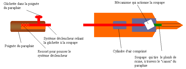 Traduction française du schéma représentant le mécanisme de mise à feu du parapluie utilisé pour assassiner le dissident bulgare Georgi Markov. Original (Image:Markov umbrella.PNG) réalisé sous MS Word par User:DO'Neil et mis dans le domaine public. Version française réalisée sous MS Paint par Utilisateur:Muad, également pour le domaine public.